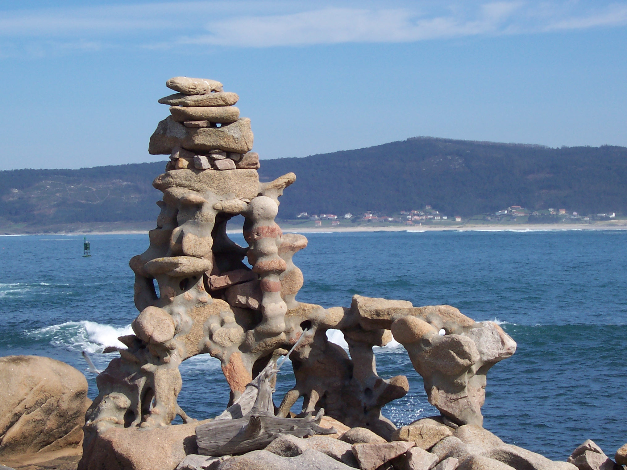 Museo de Man, Camelle, Camariñas, Galiza